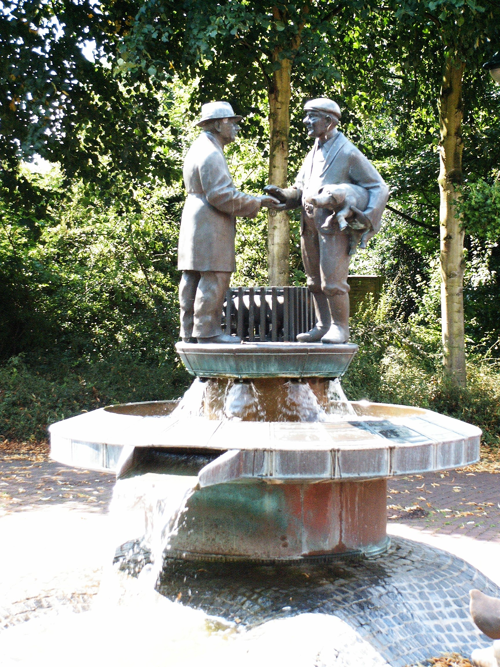 Sonsbeck: Brunnen "Ferkelmarkt"